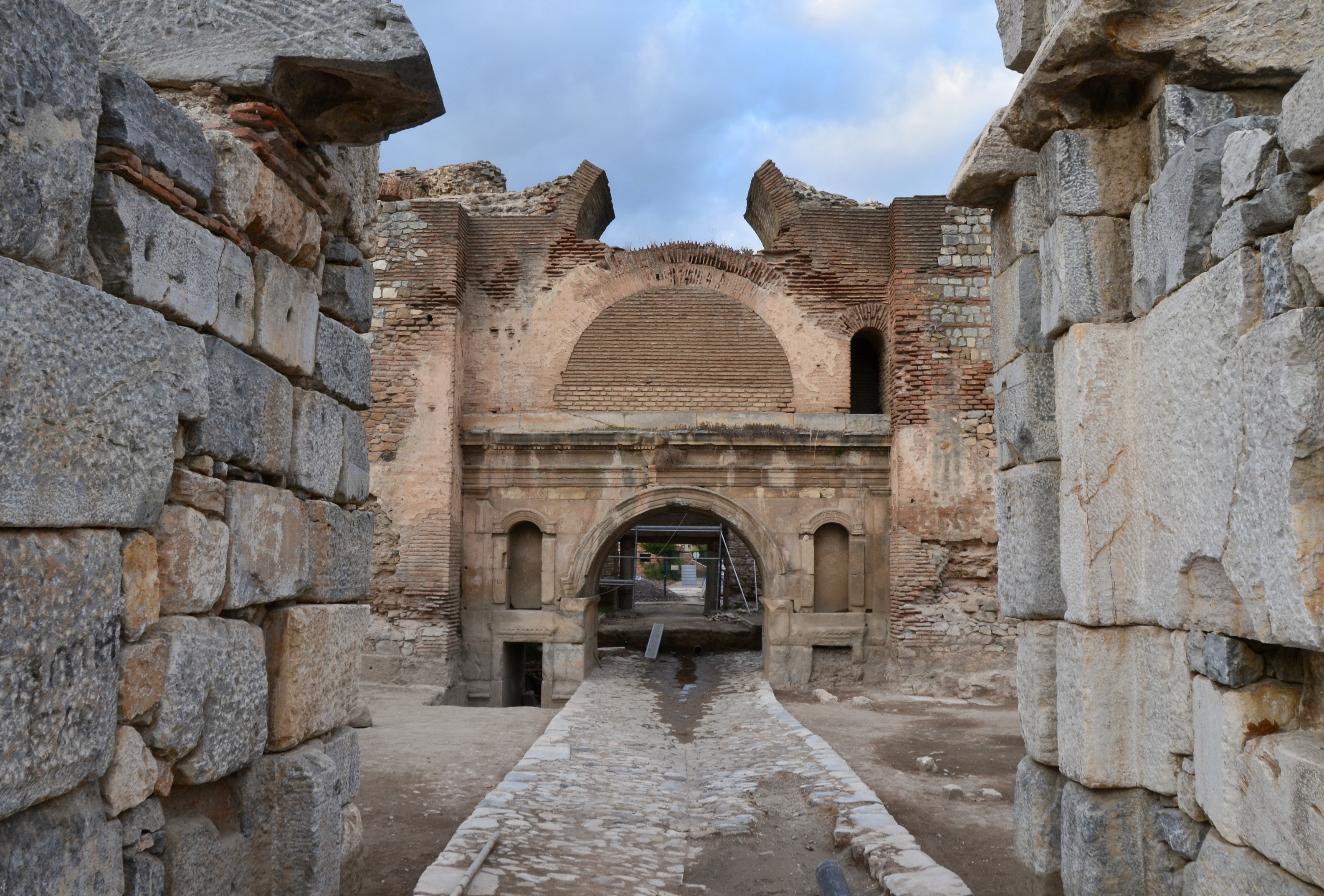 Istanbul Gate, Iznik, Turkey